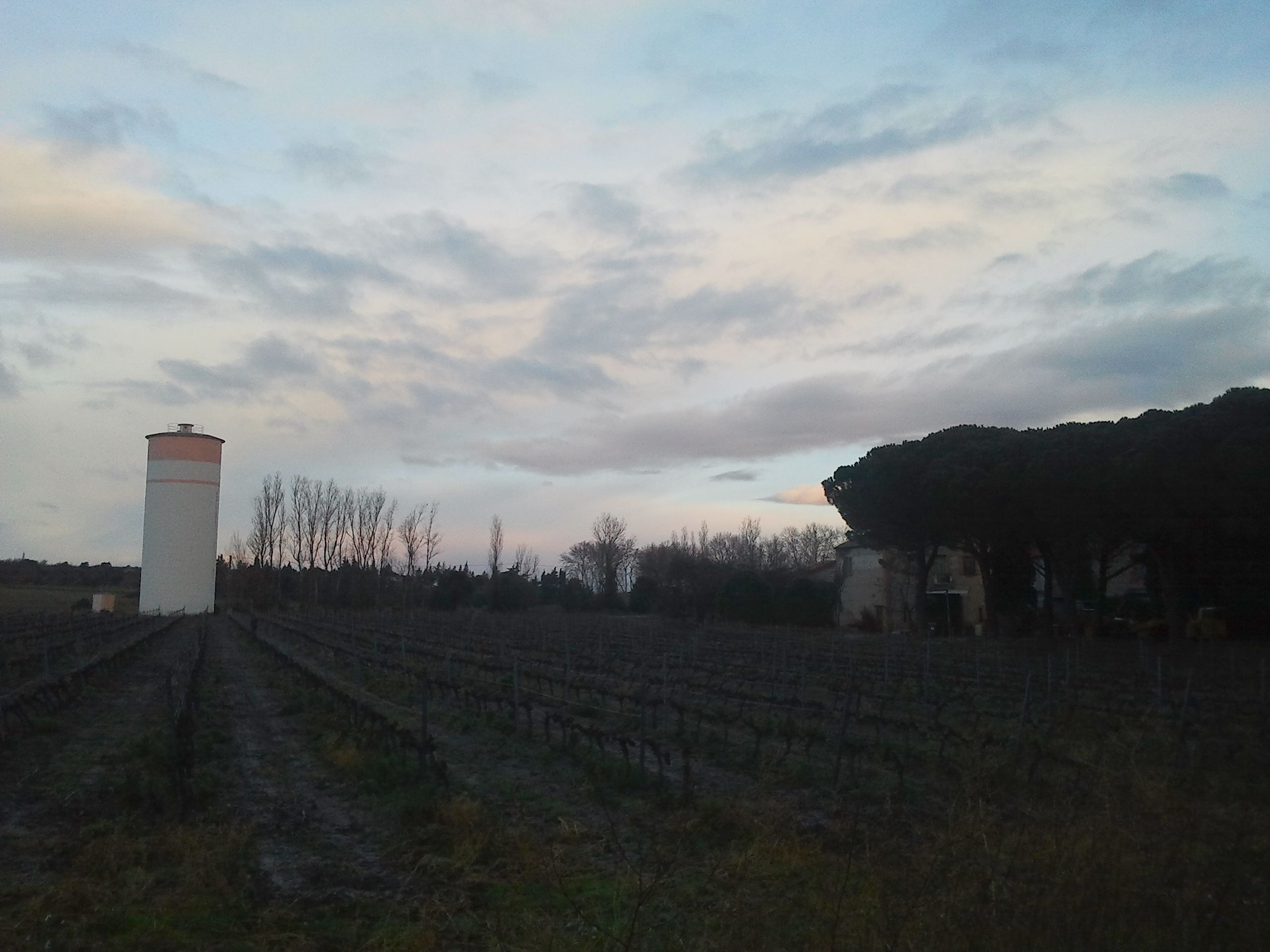 Vigne et château d'eau un matin d'hiver à Saint-Jean-Lasseille